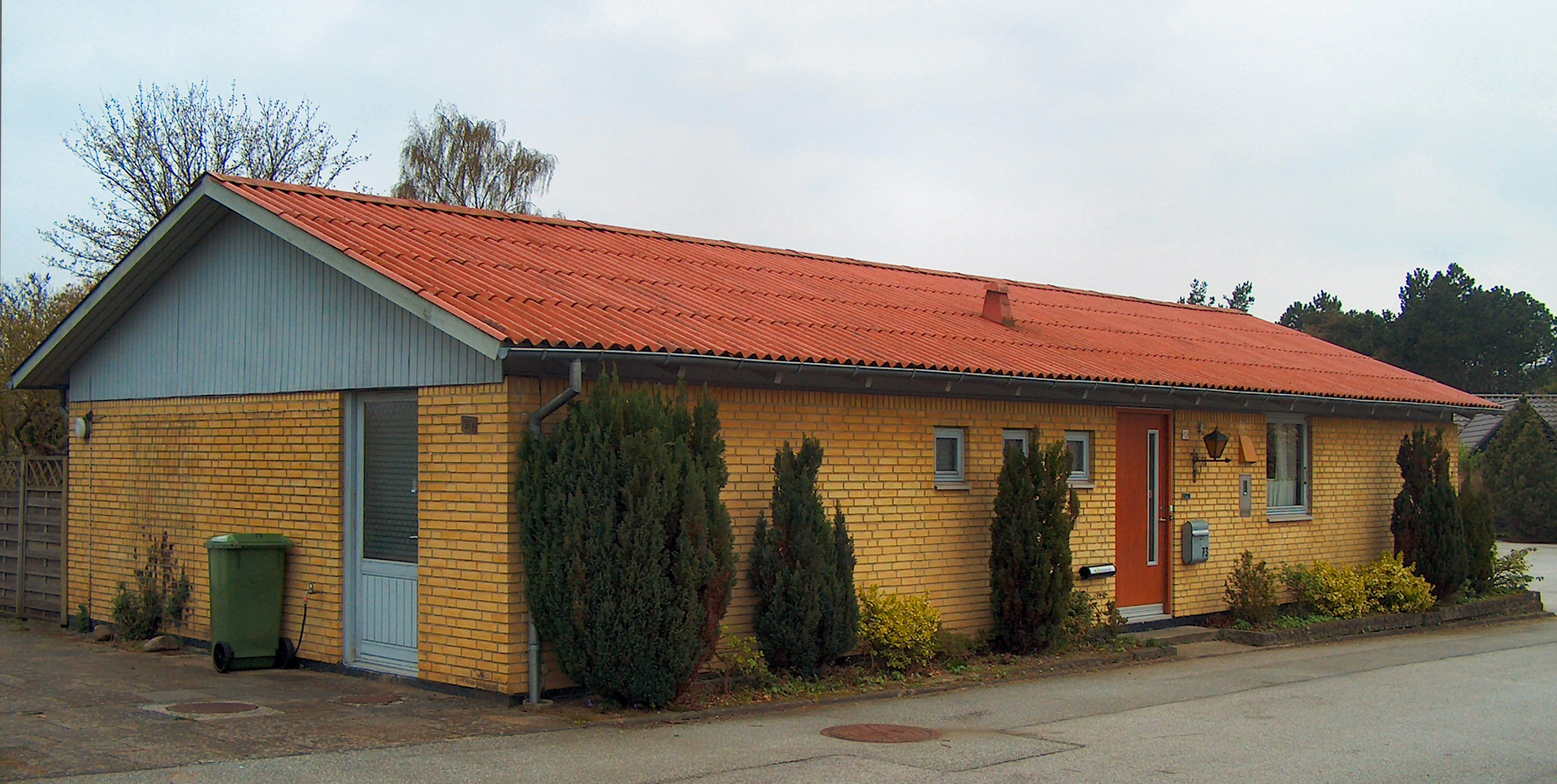 typehus i Århus